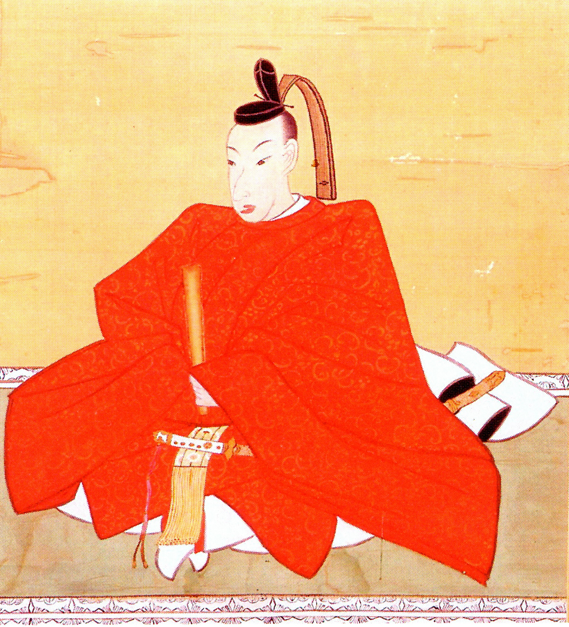 岡部長和の肖像。